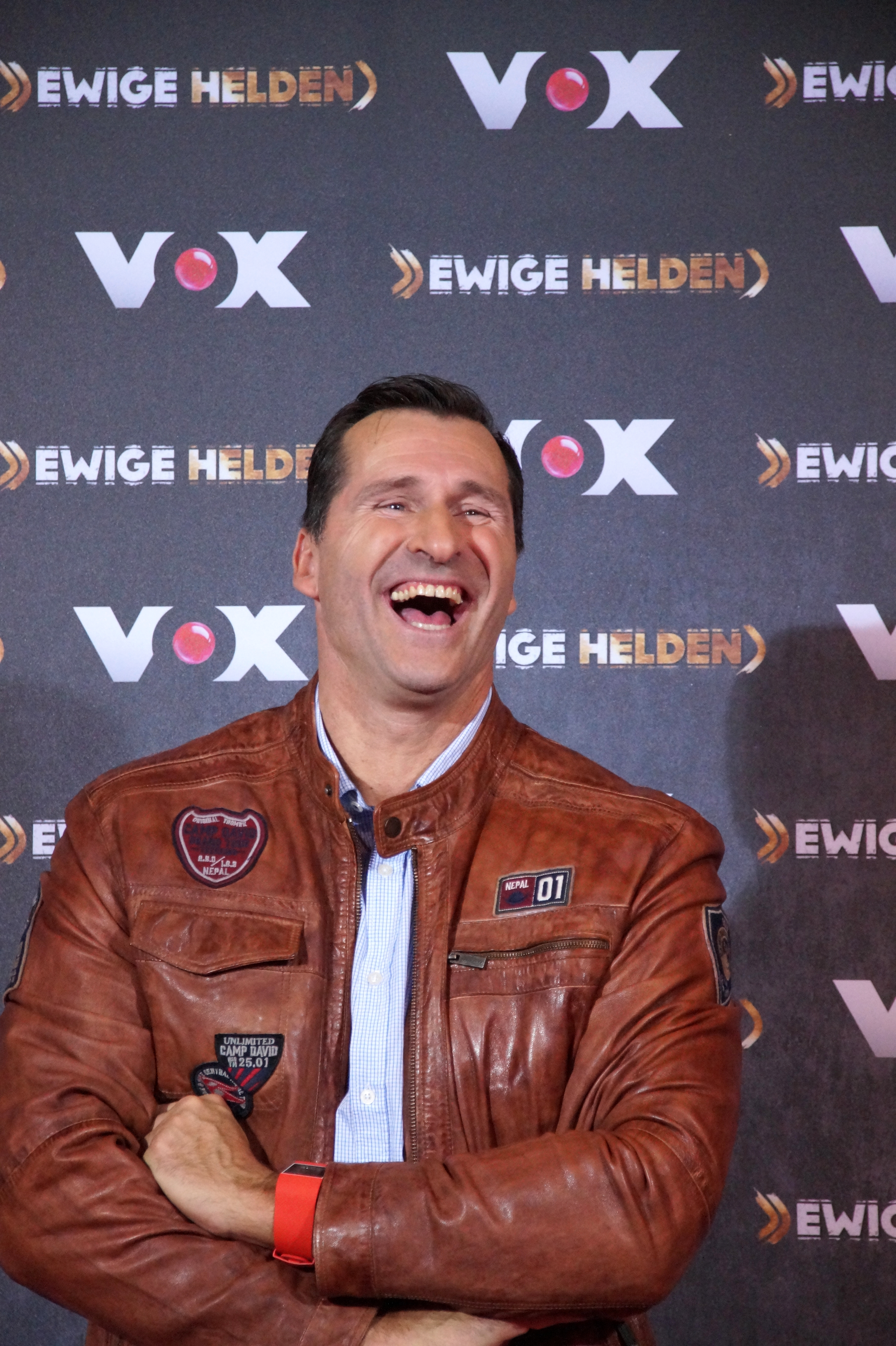 Lars Riedel beim VOX "Ewige Helden" Pressetermin, im Dezember 2015.